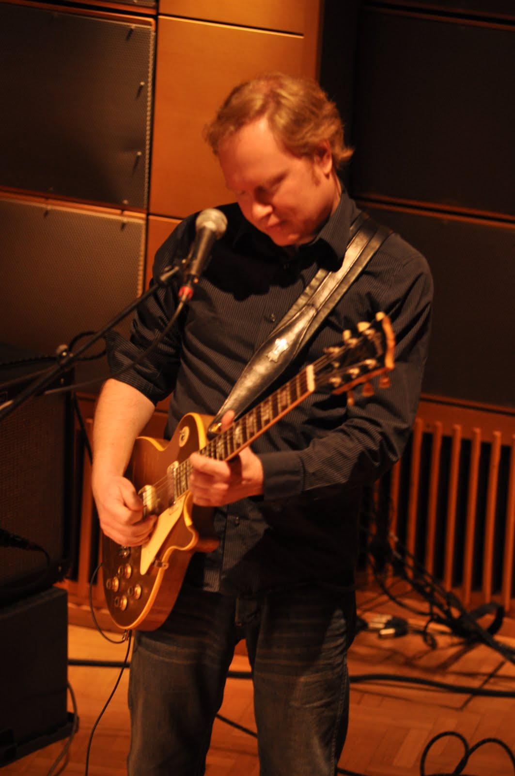 Peter Engberg